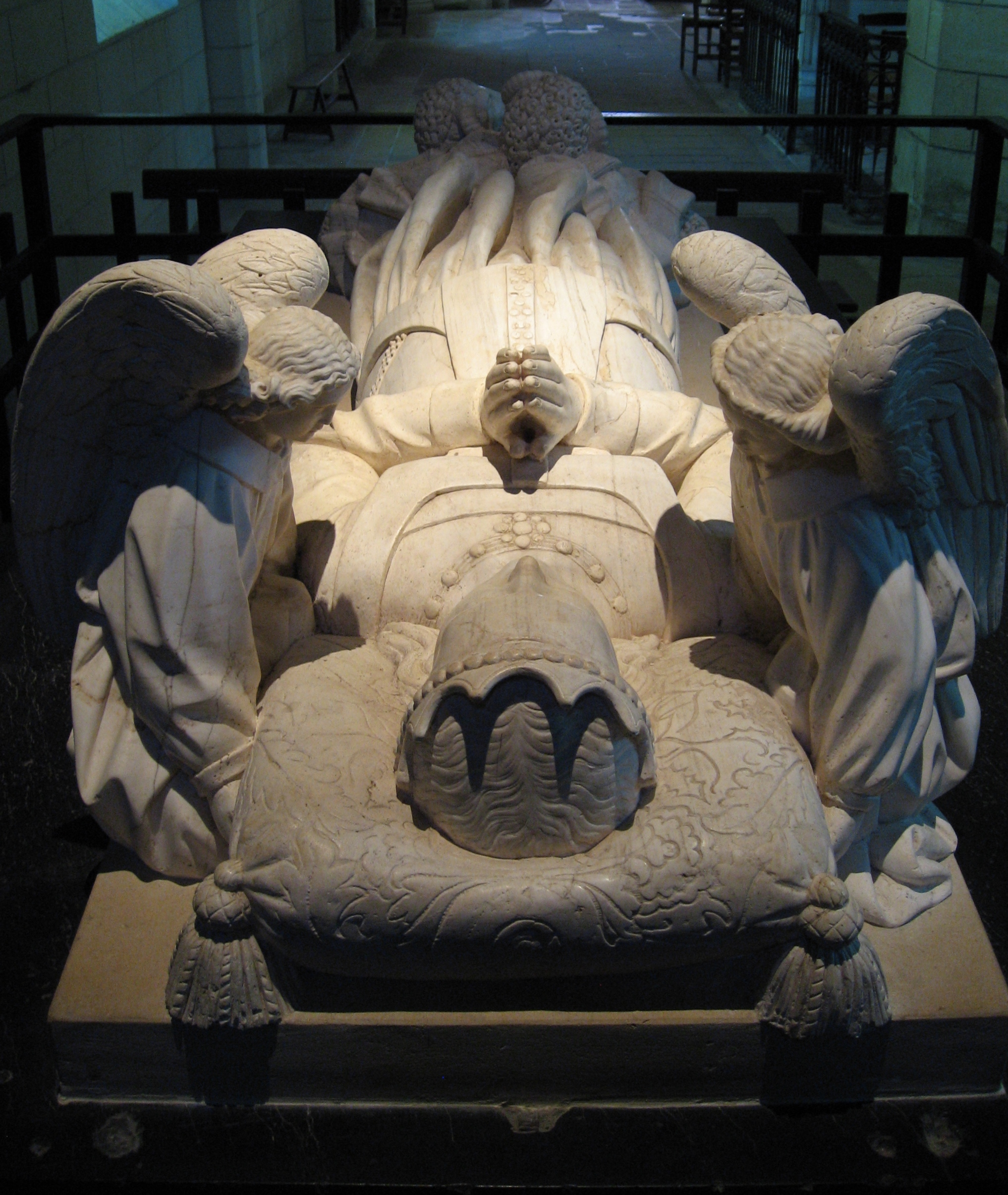 Détail du gisant d'Agnès Sorel en la Collégiale Saint-Ours de Loches